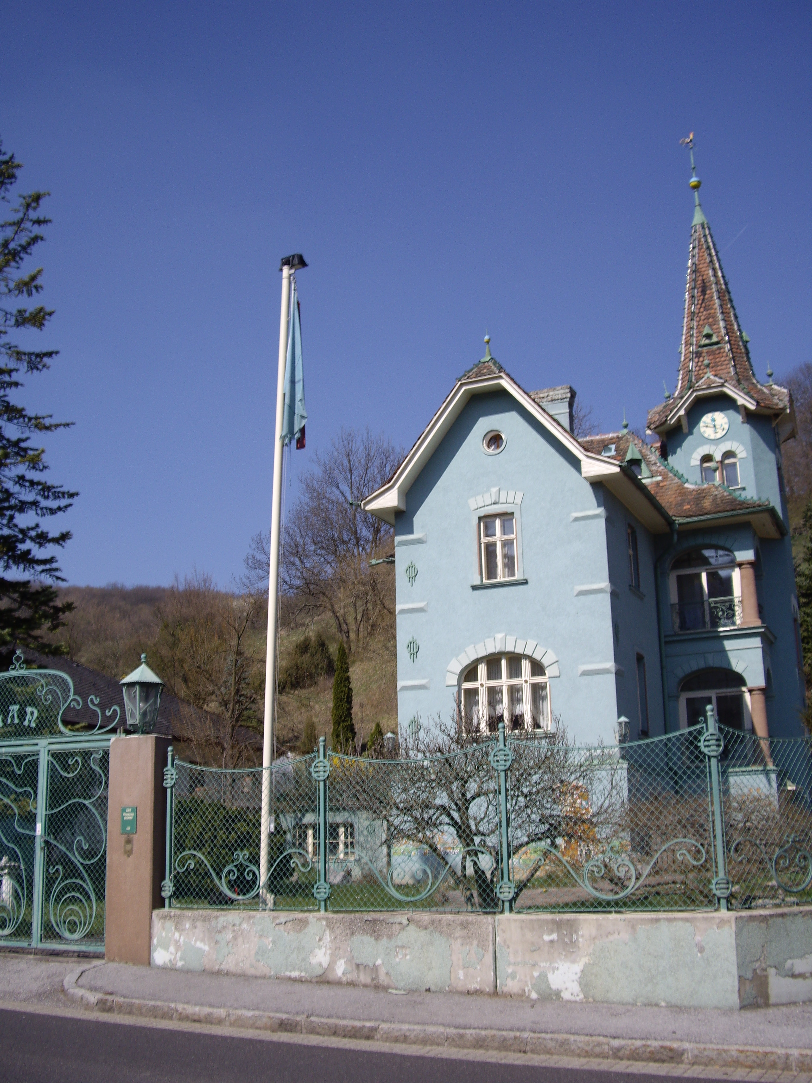 Kasteleto Neumann, eldonisto de "Klostronovburga Gazeto".